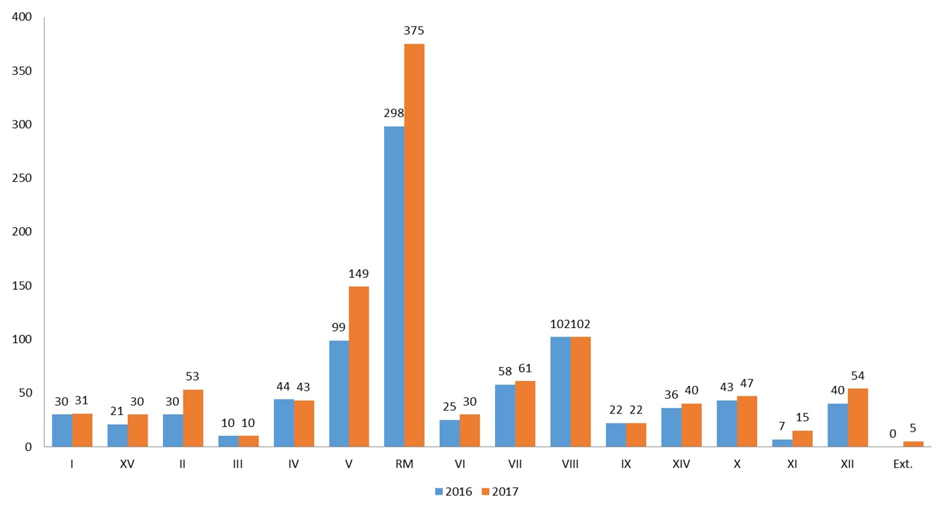 Gráfico DPC actividades por región años 2016 y 2017